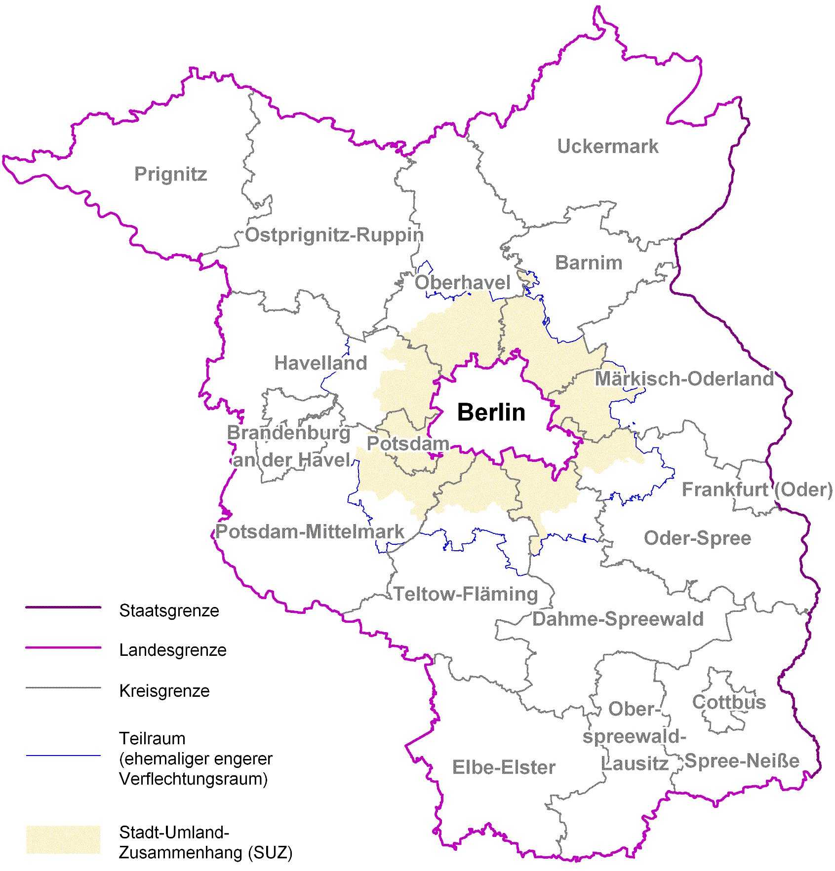 Storstadsregion Berlin-Brandenburg. Berlins storstadsområde, Stadt-Umland-Zusammenhang (SUZ), är gulmarkerat för dess utsträckning inom Brandenburg.